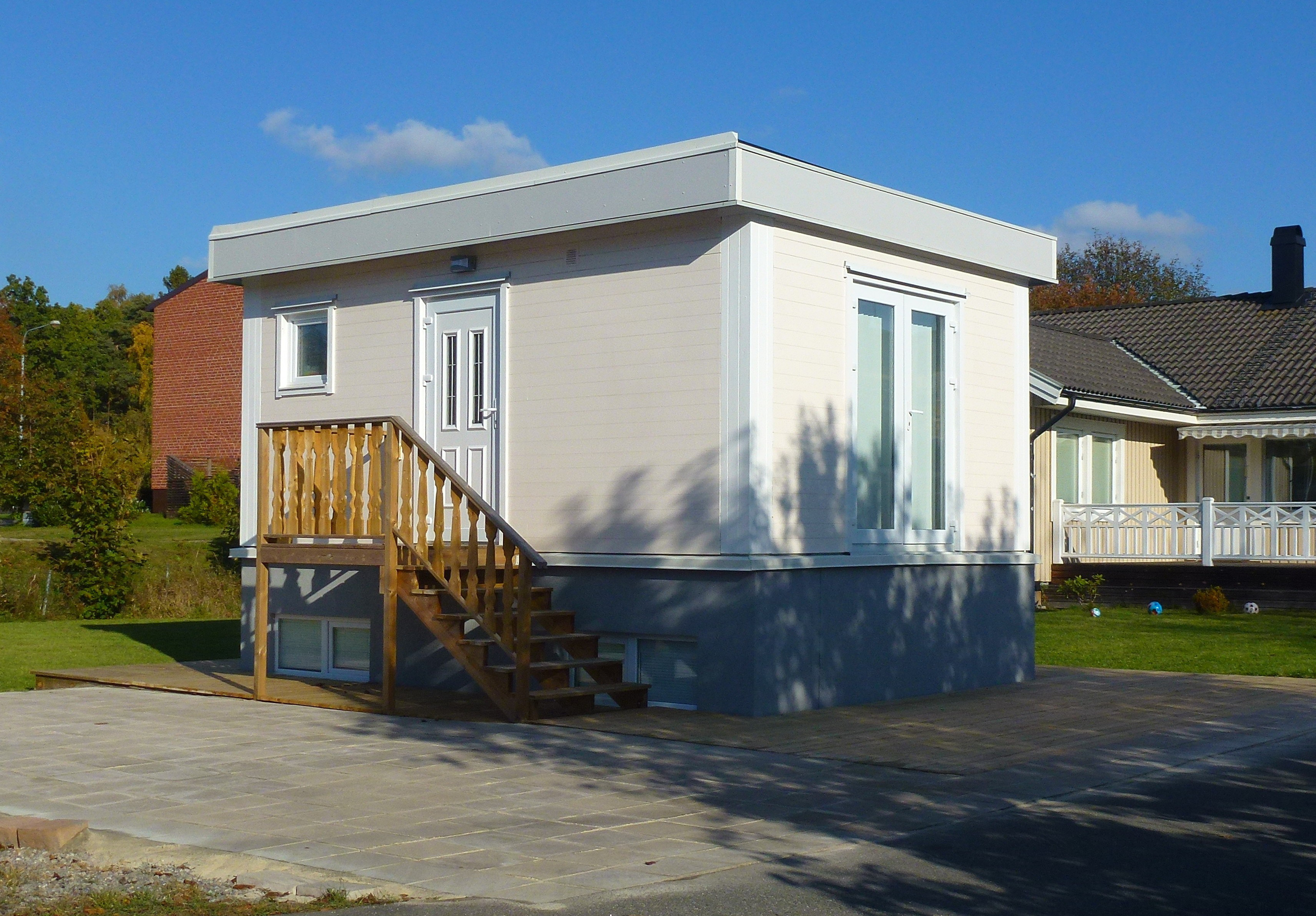 Ett Attefallshus i Segeltorp, Huddinge kommun